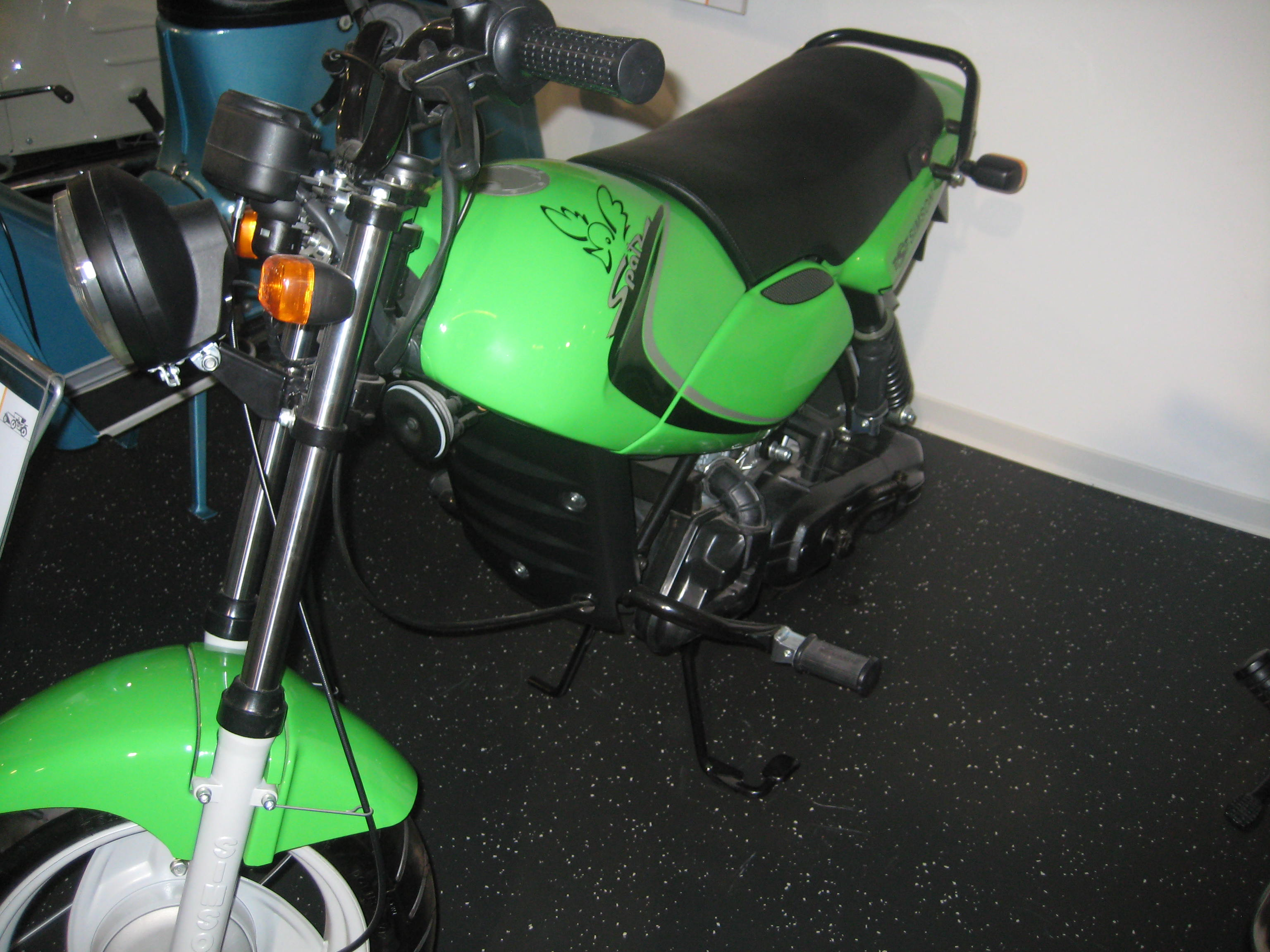 Zdjęcie przedstawiające motorower Simson MSA50 (Spatz 50) będący eksponatem w Fahrzeugmuseum Suhl.